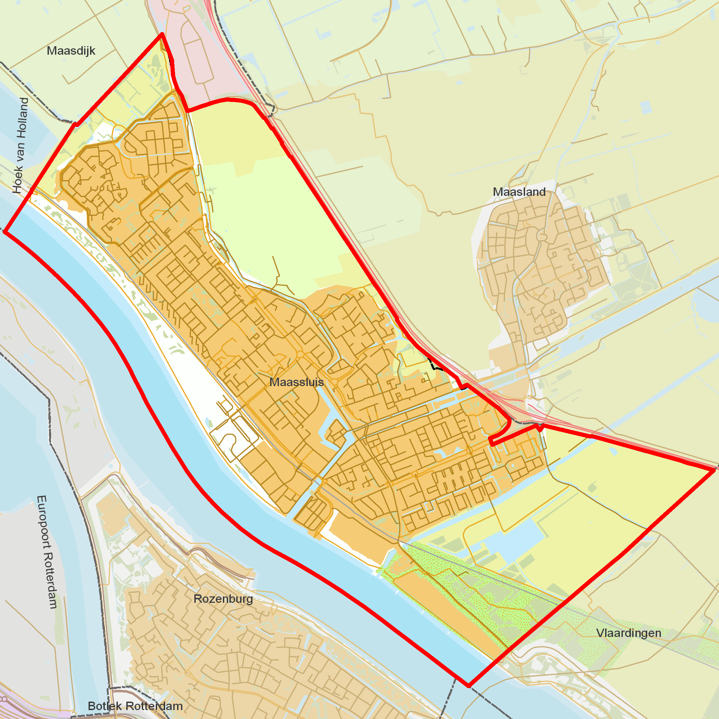 BAG woonplaatsen - Gemeente Maassluis.png